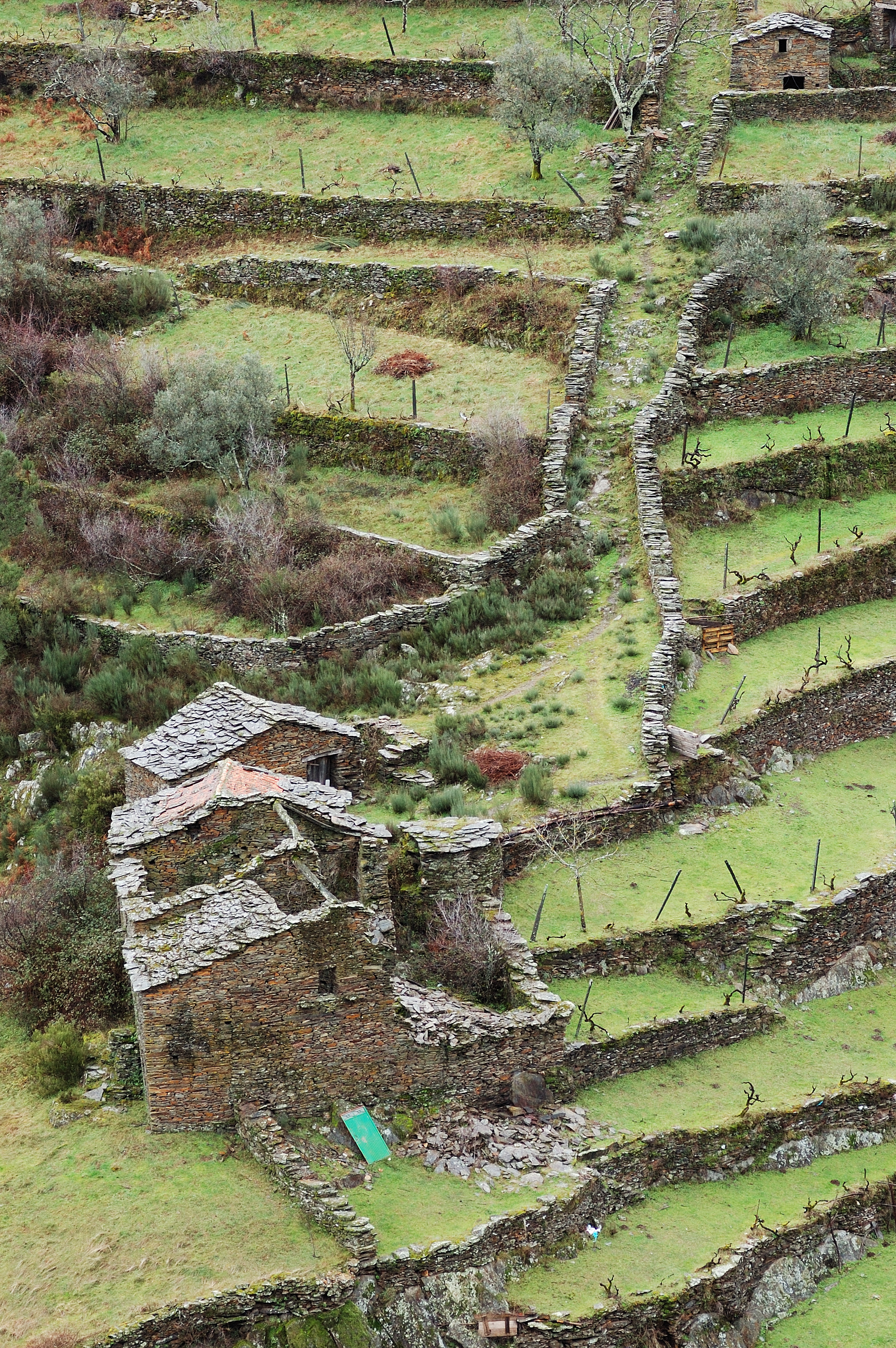 Alvoco da Serra, Serra da Estrela, Portugal [2010]